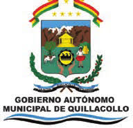 Escudo que representa a Quillacollo.